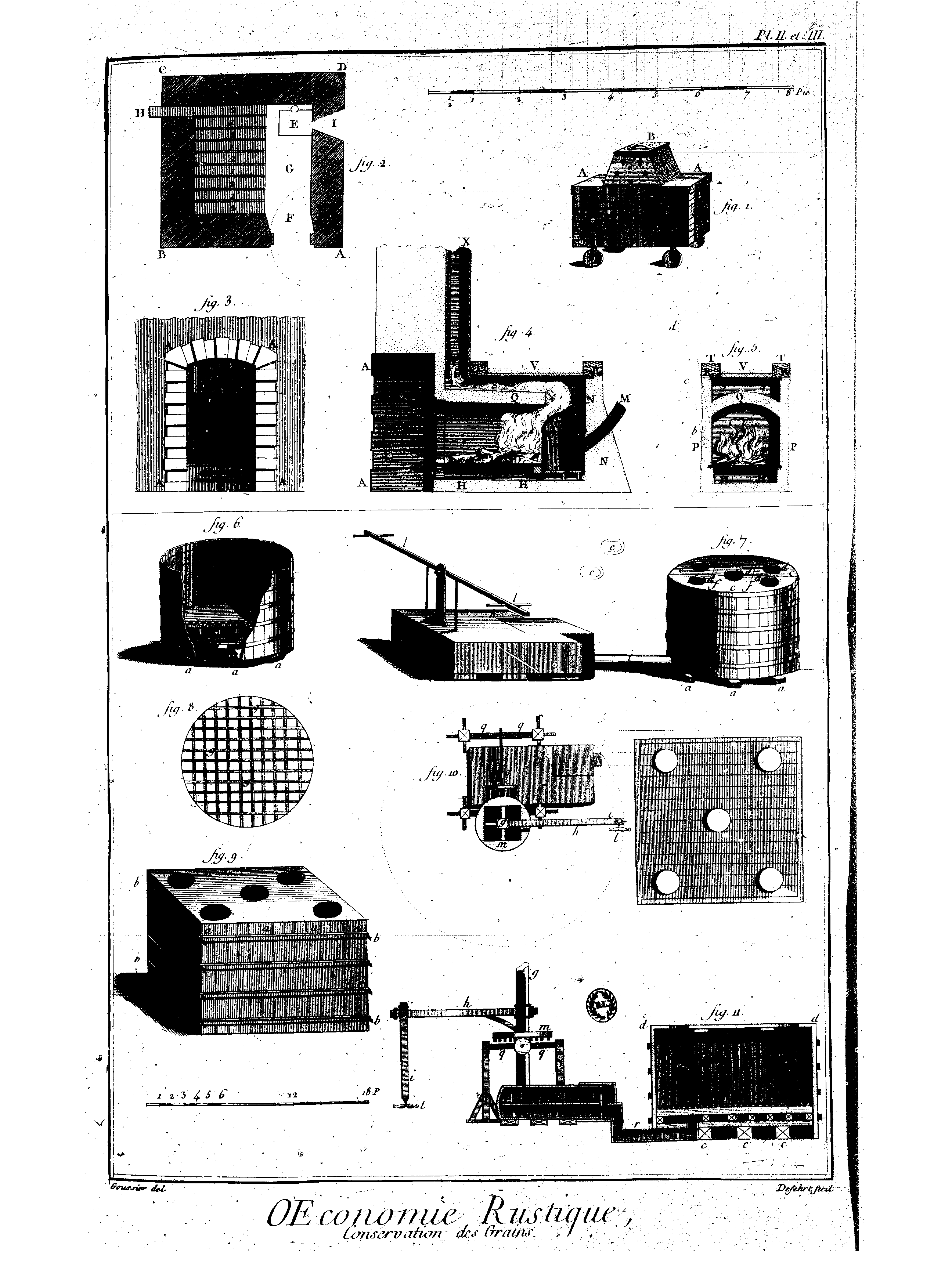 Planches de l'Encyclopédie de Diderot et d'Alembert, volume 1.